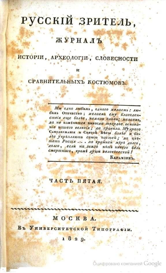 Обложка журнала «Русский зритель»